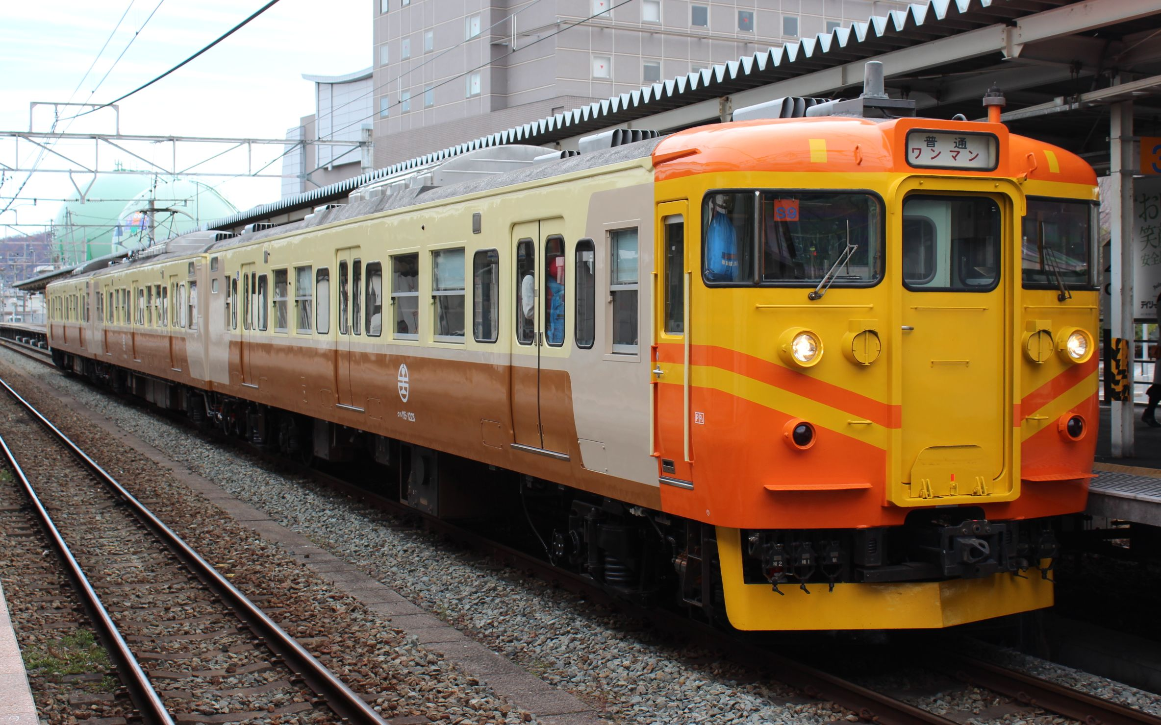 しなの鉄道115系S9編成 台湾鉄路管理局EMU100型電車塗装